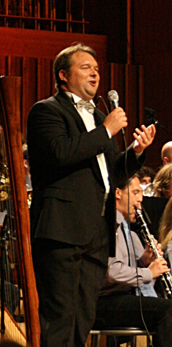 Dobrotvorni koncert "Križ nek' ti sačuva ime" u koncertnoj dvorani Vatroslav Lisinski u Zagrebu.